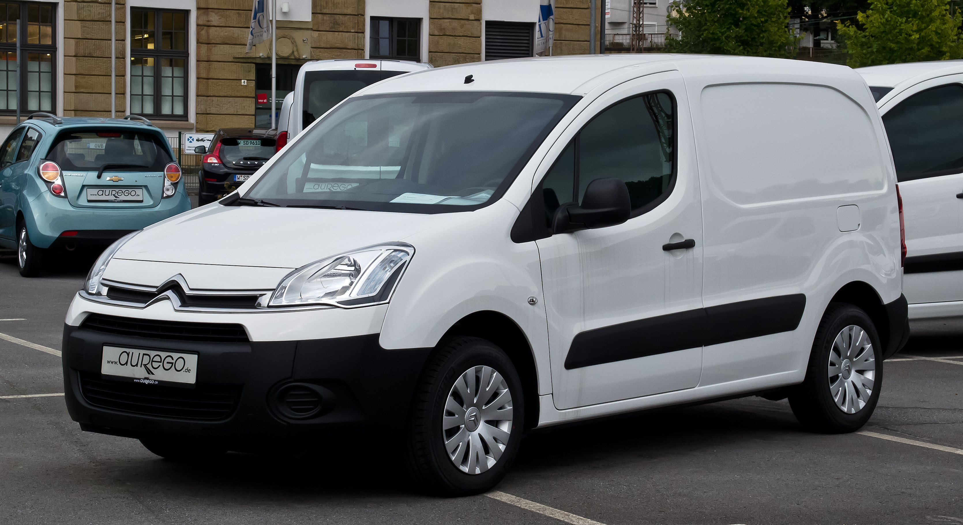 Citroën Berlingo Kastenwagen e-HDi 90 (II, Facelift)